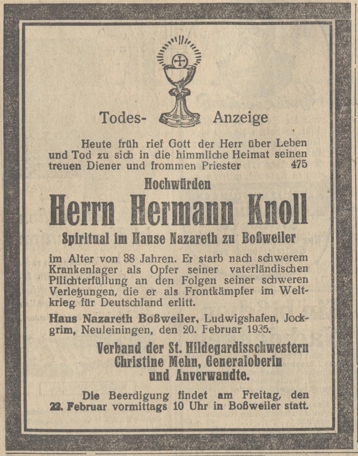 Pfarrer Hermann Knoll, Diözese Speyer, Todesanzeige